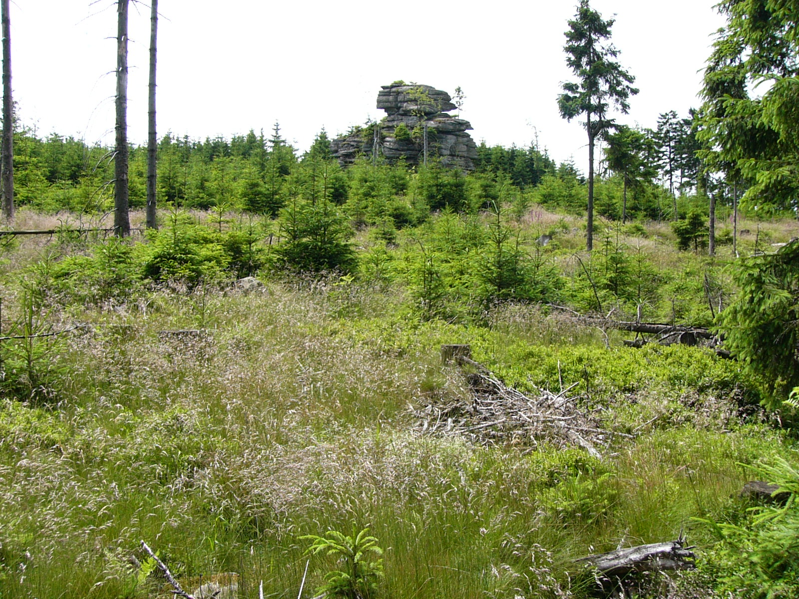 Kleiner Waldstein